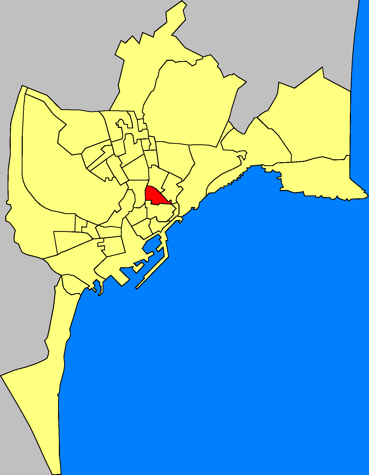 Barrios de la ciudad de Alicante